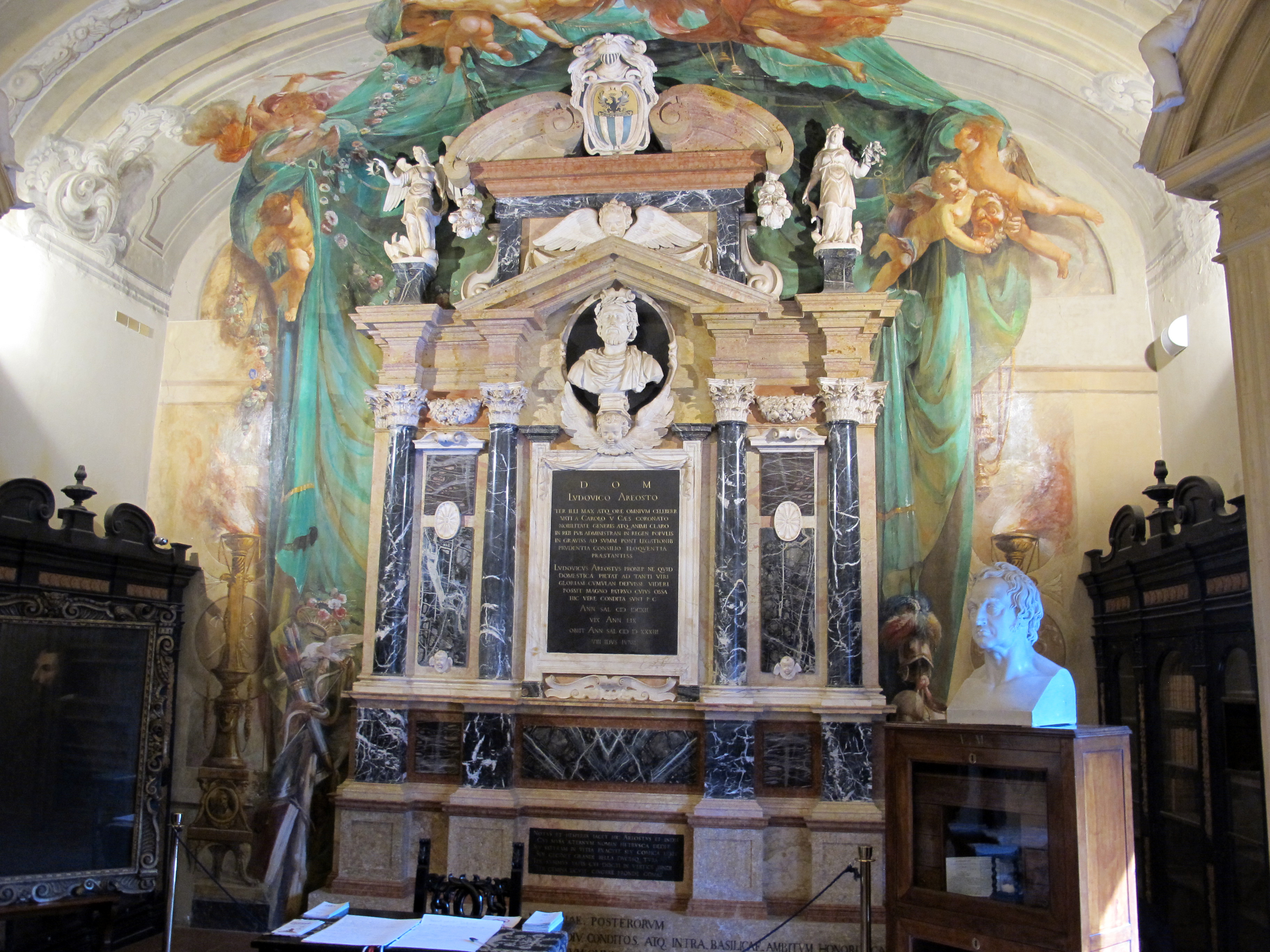 Palazzo Paradiso This is a photo of a monument which is part of cultural heritage of Italy.